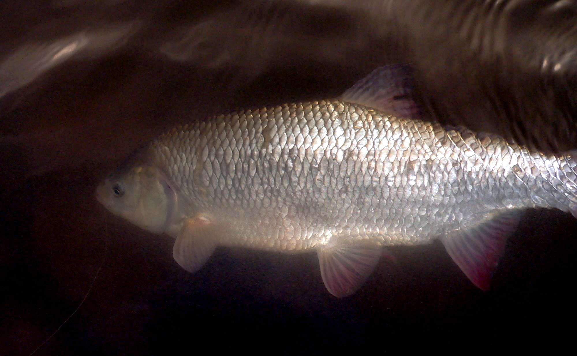 Leuciscus Idus under water